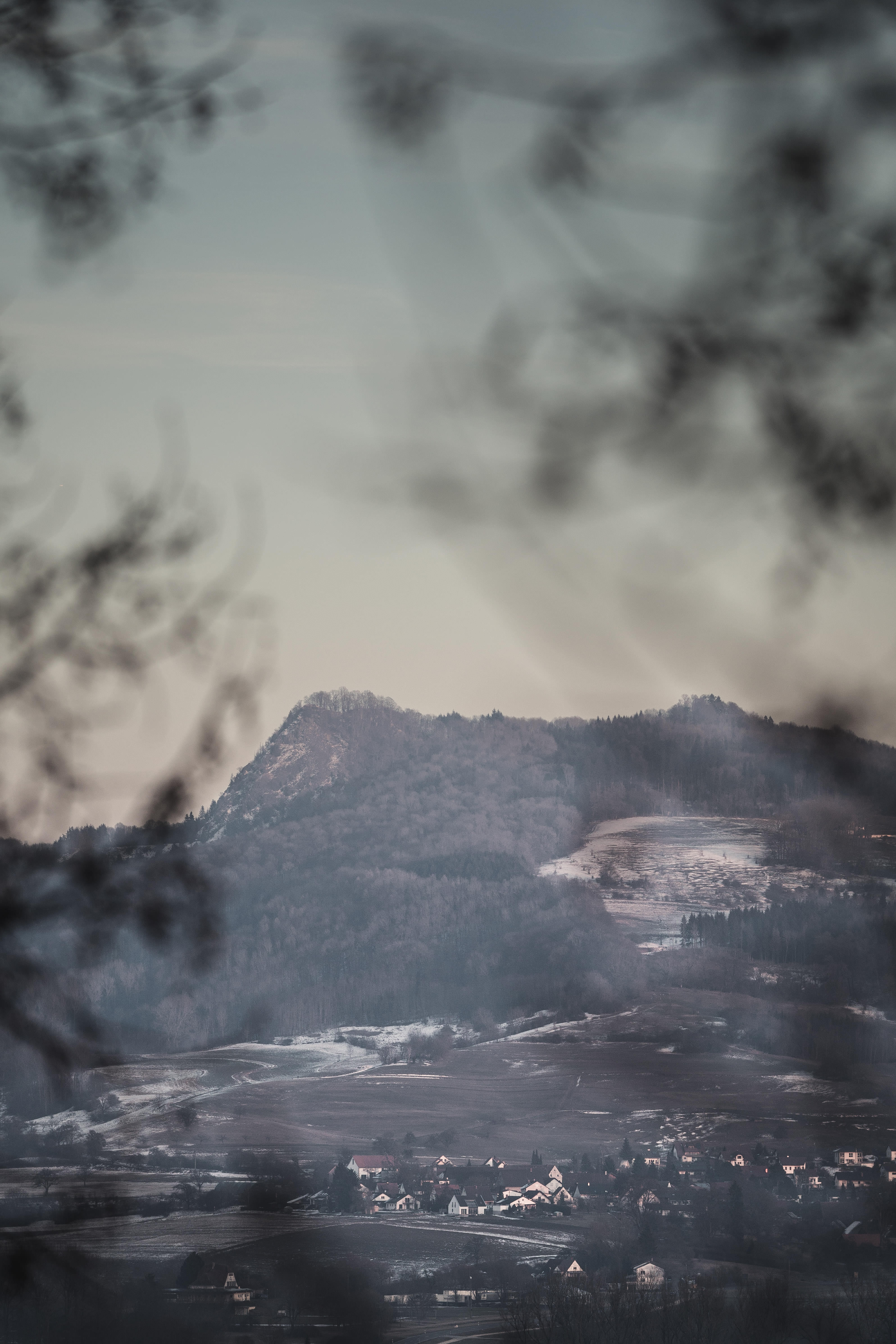 Aussicht auf die Westseite des Hohenstoffeln - Aussicht vom Fernsehturm bei Beuren am Ried